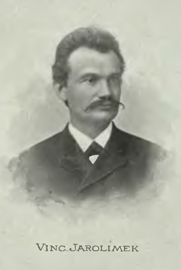 Portrét – Vincenc Jarolímek (1846-1921), Český matematik .